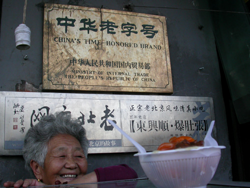 A Lao Zihao in Houhai, China.